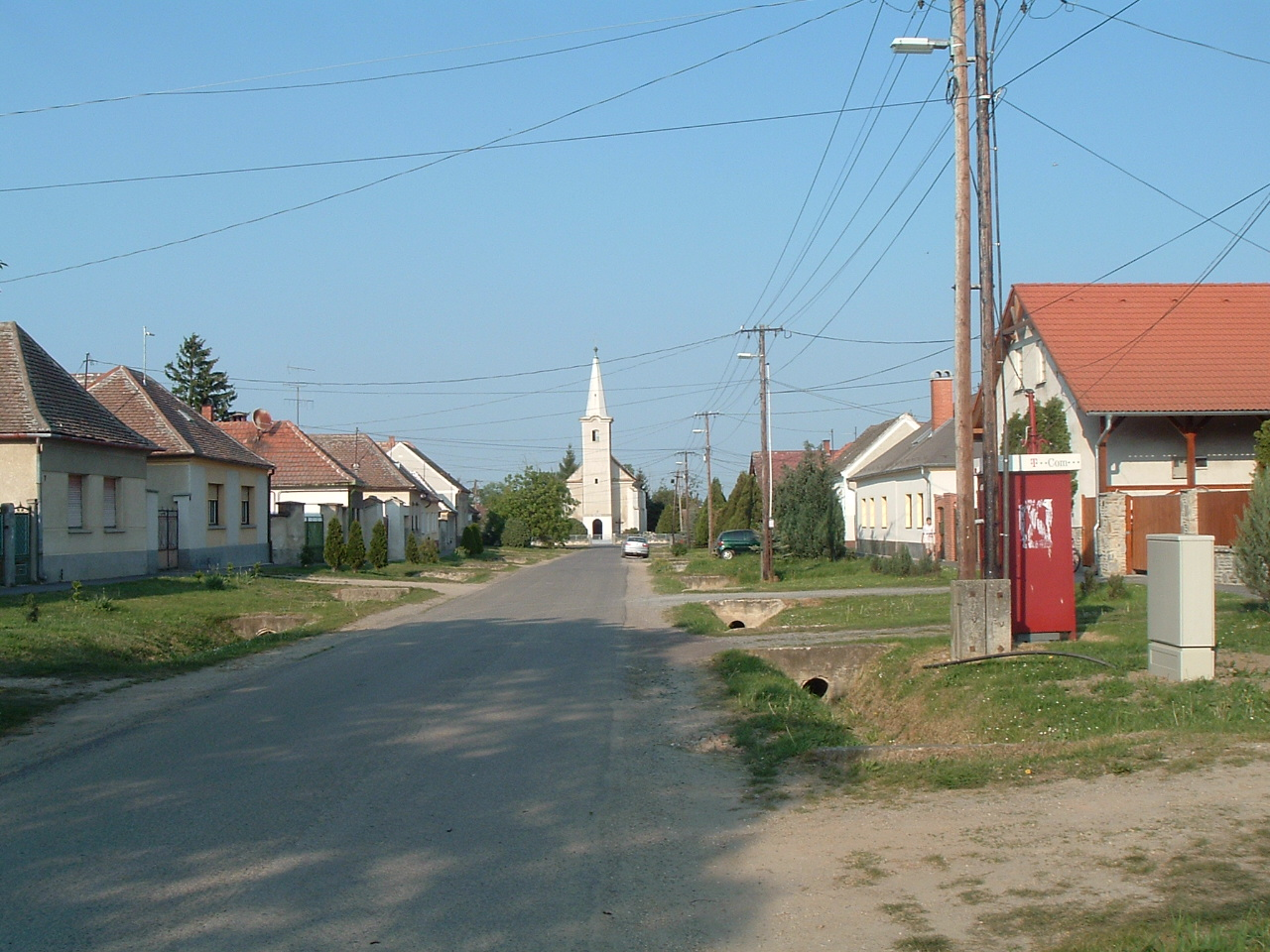 Kőszegpaty, Szent Miklós római katolikus templom